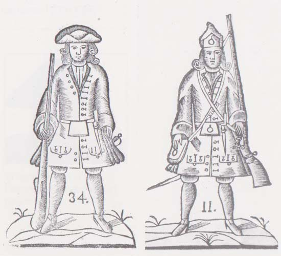 Manuel de formación del ejército de Cataluña 1714. Exercicio practico y especulativo de el fusilero, y granadero del coronel Juan Francisco Ferrer. Impreso en el Real Convento de S. Domingo, Mallorca,año 1714